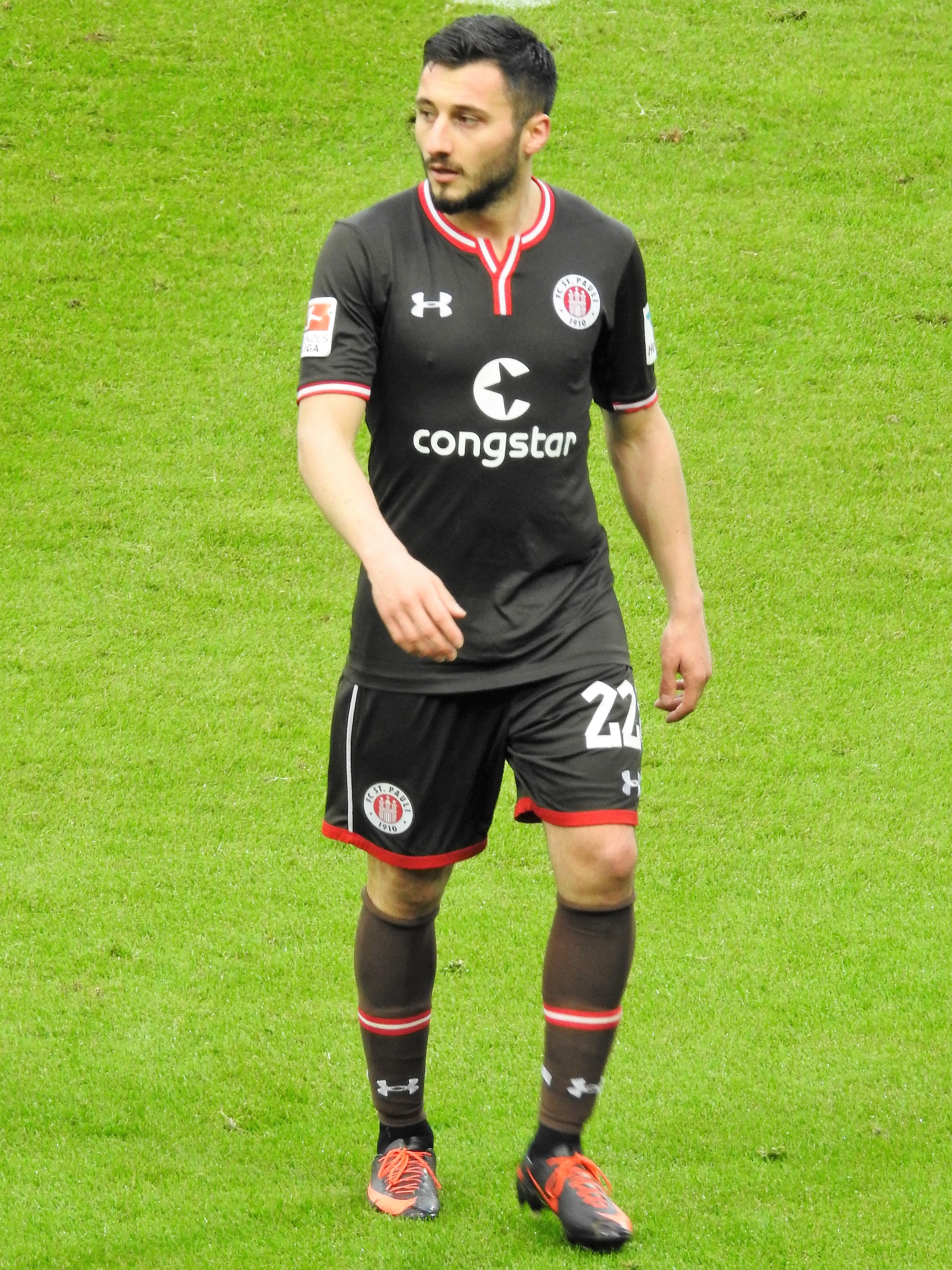 Cenk Şahin 2017